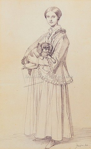 Mlle de Reiset, vicomtesse de Ségur-Lamoignon